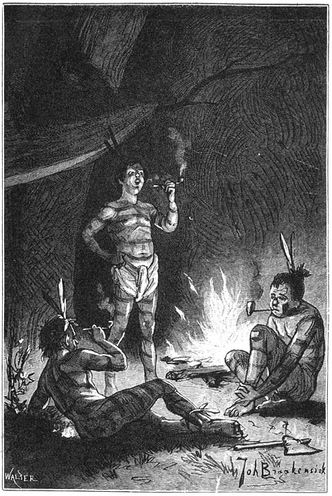 Mark Twains Dutch Translation 'De Lotgevallen van Tom Sawyer' painting from Johan Braakensiek